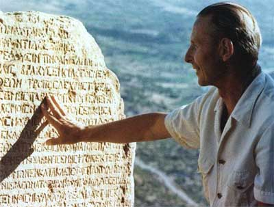 Friedrich Karl Dörner, deutscher Archäologe